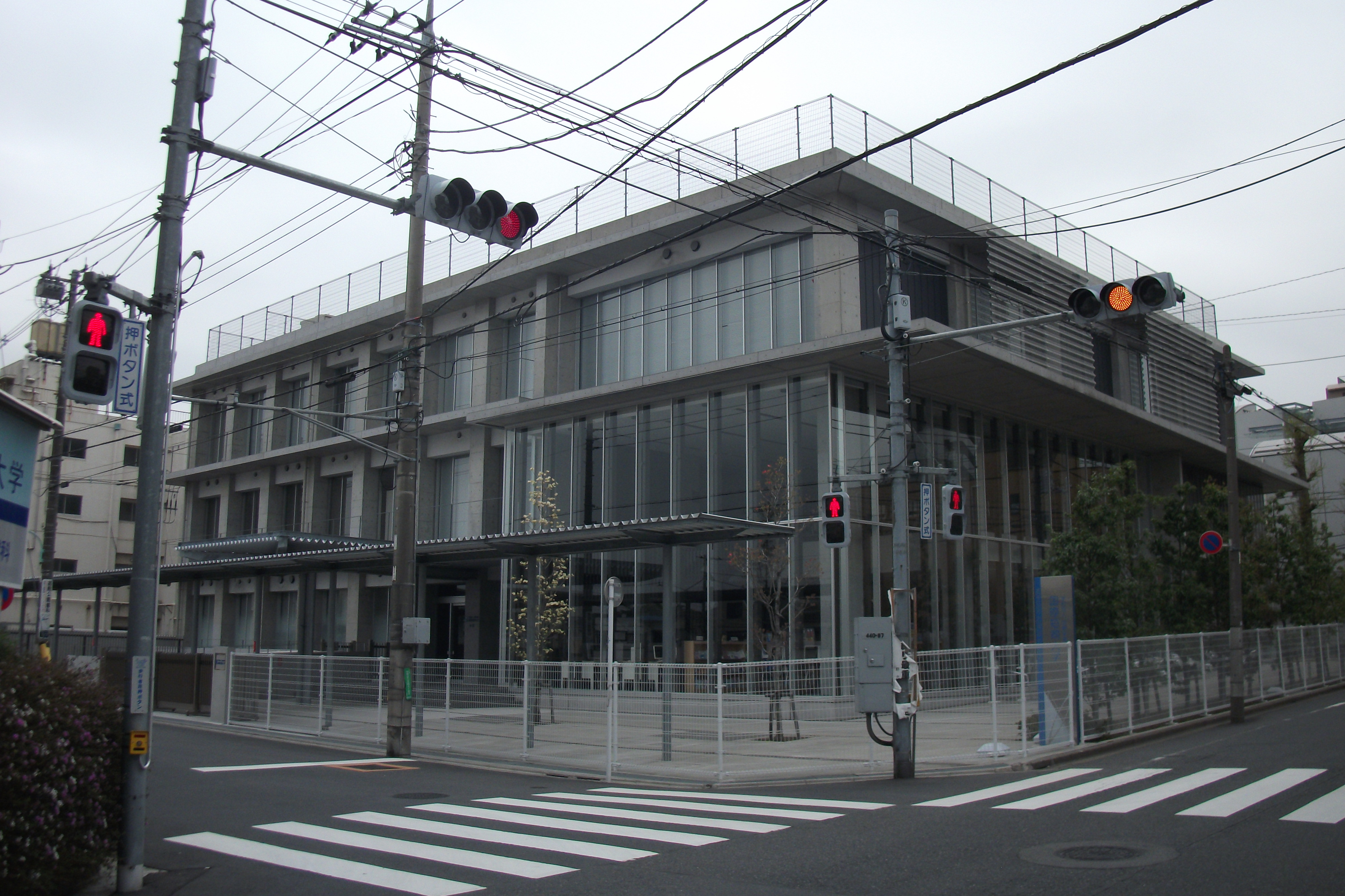 国際短期大学 本館